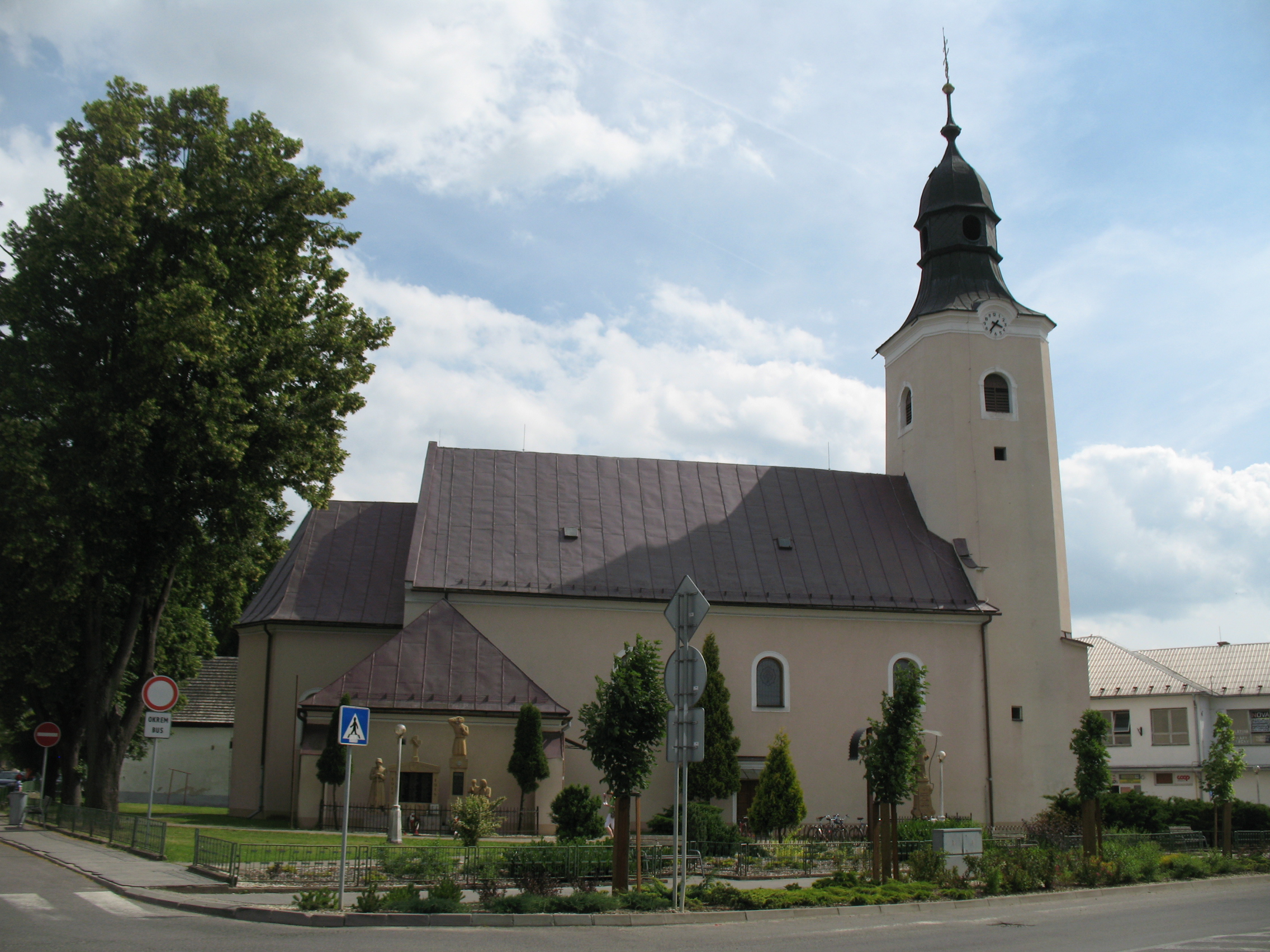 BellusSlovenčina: Farský kostol sv. Alžbety Uhorskej v Beluši